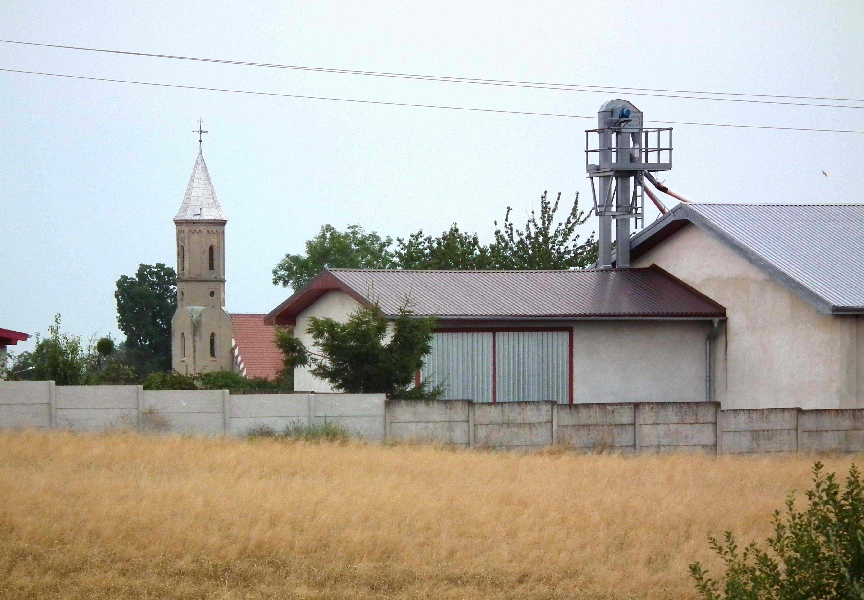 Dobrzenice. Widok od dawnej stacji kolejowej.